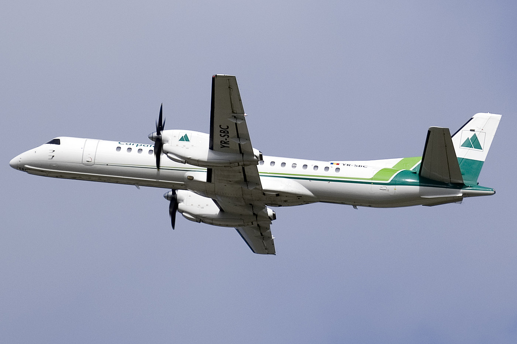 Carpatair Saab 2000 YR-SBC